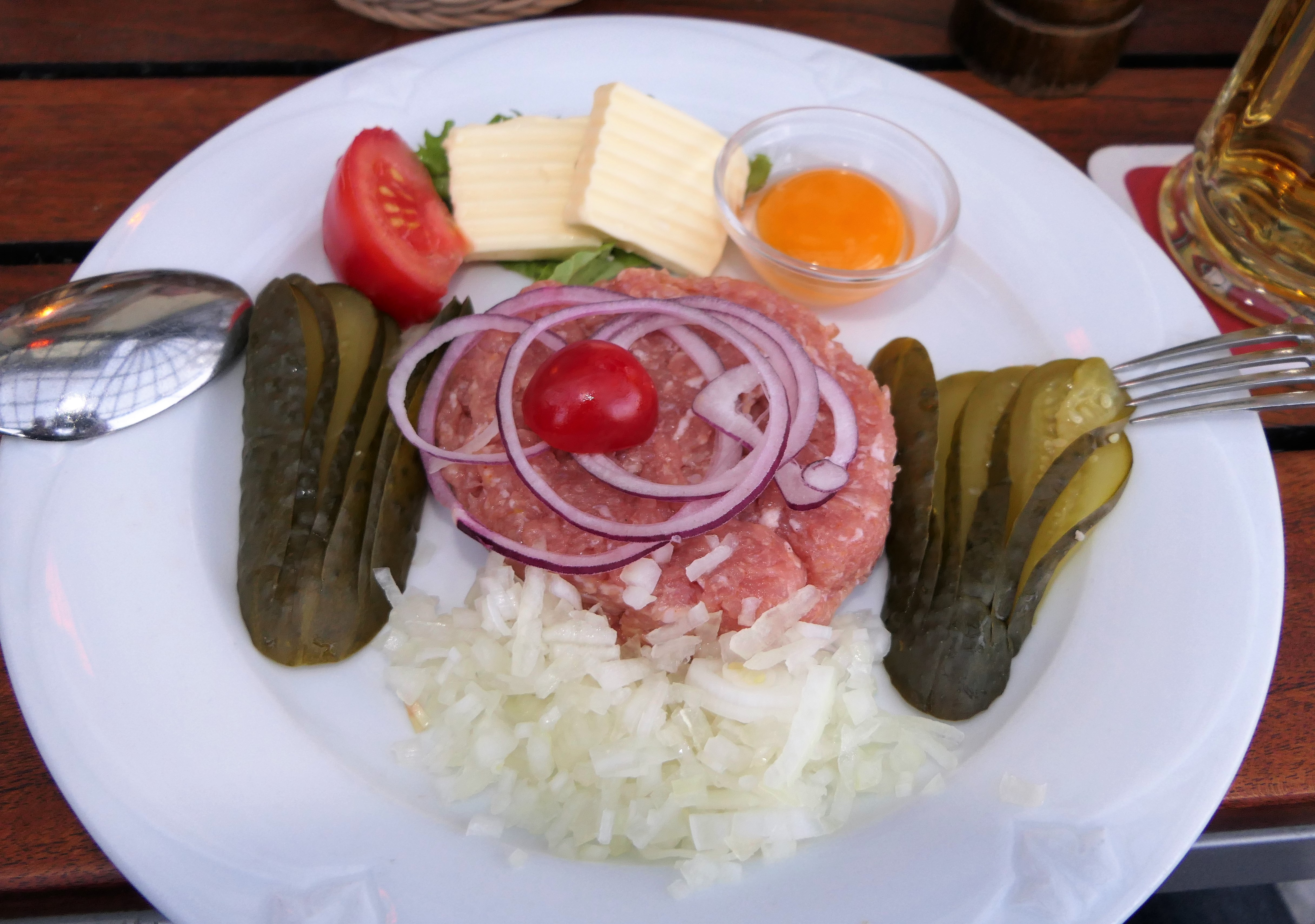 Schinkenmett mit Eigelb, Zwiebeln und Gewürzgurken, Schillergarten, Dresden 2018